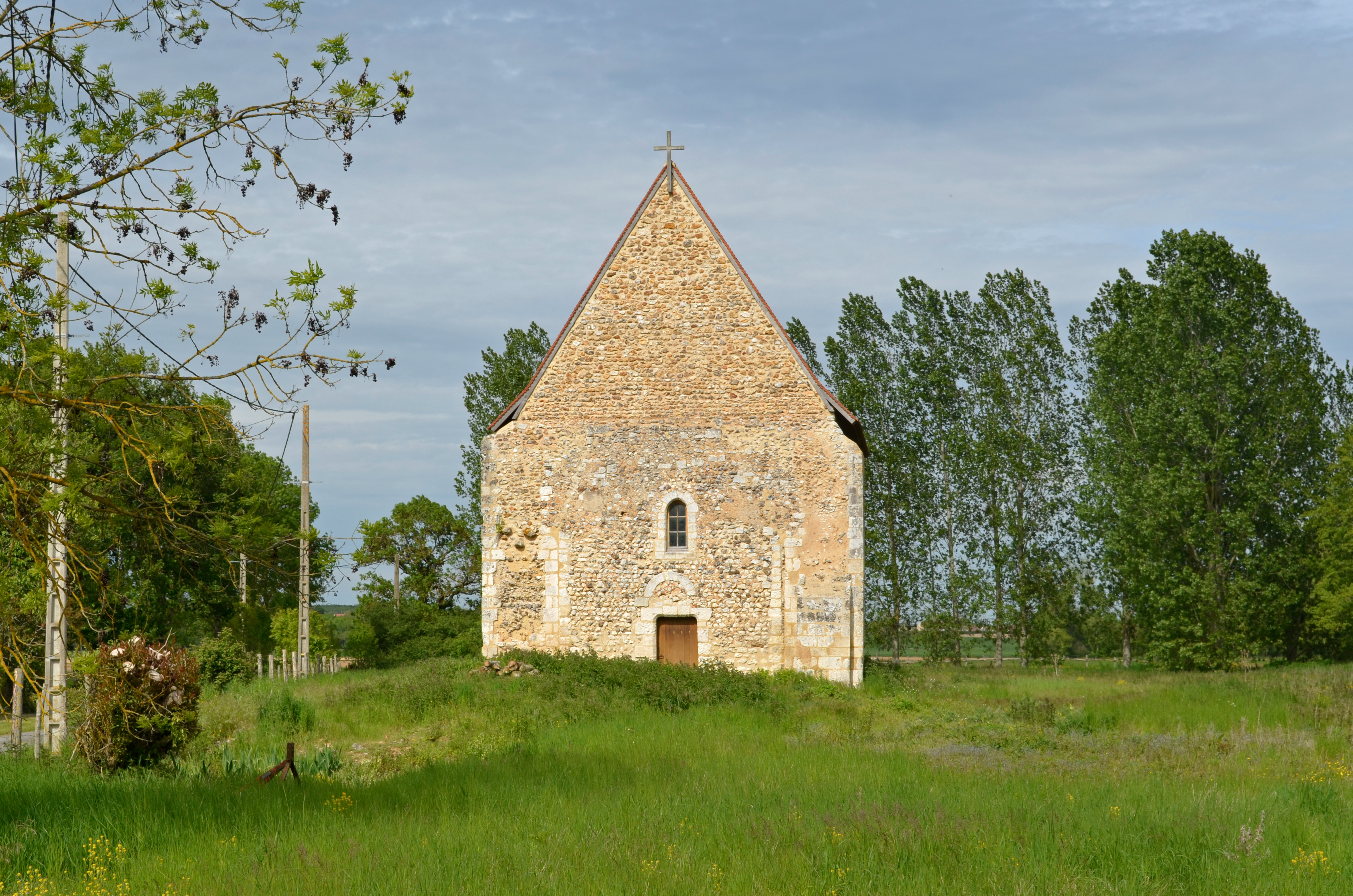 chapelle Saint-Pierre de Vouvray, Saint-Denis-les-Ponts, Eure-et-Loir, France.